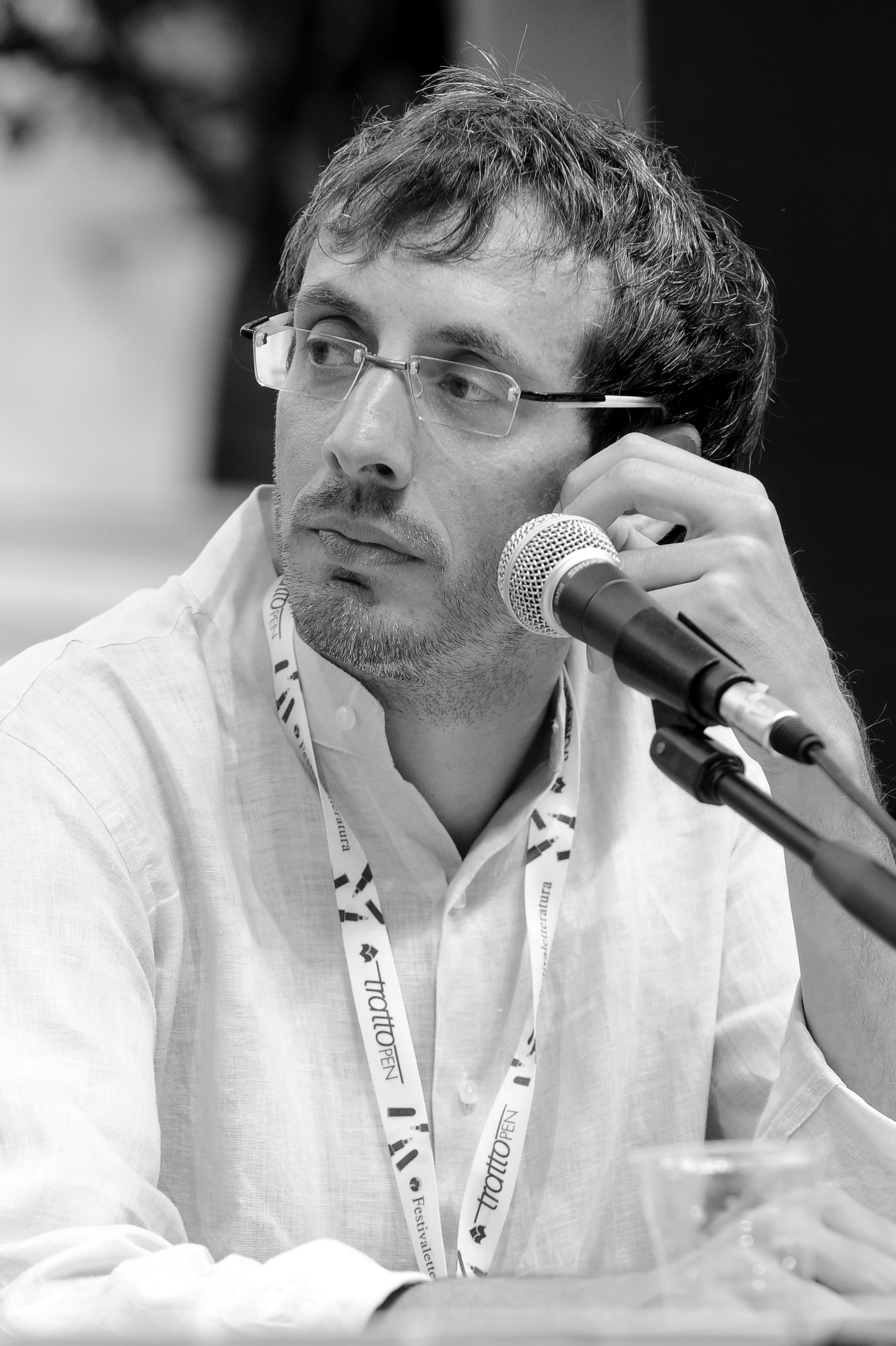 Federico Taddia a Mantova al Festivaletteratura 2012.